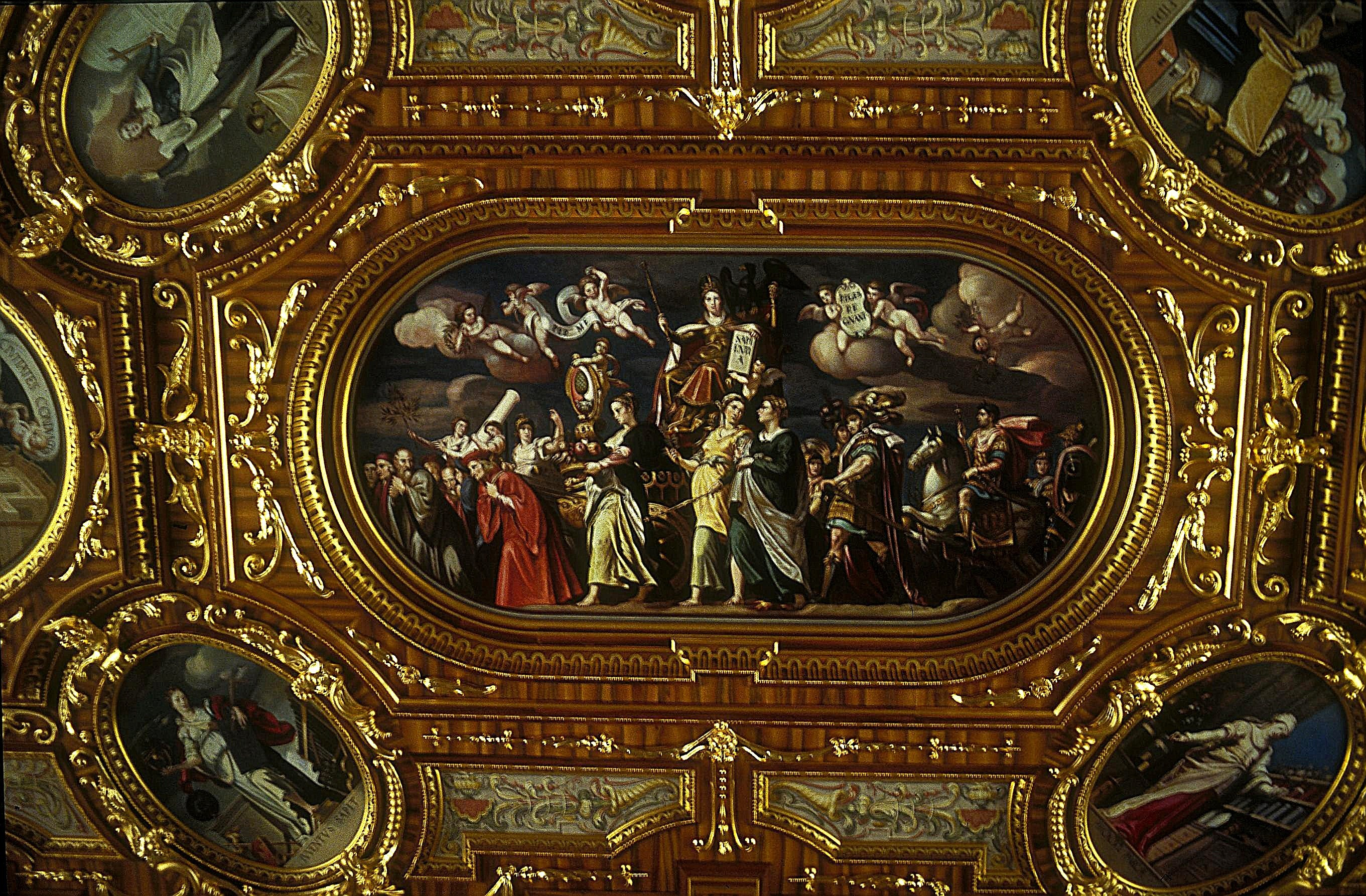 Decke im Goldenen Saal des Rathauses von Augsburg